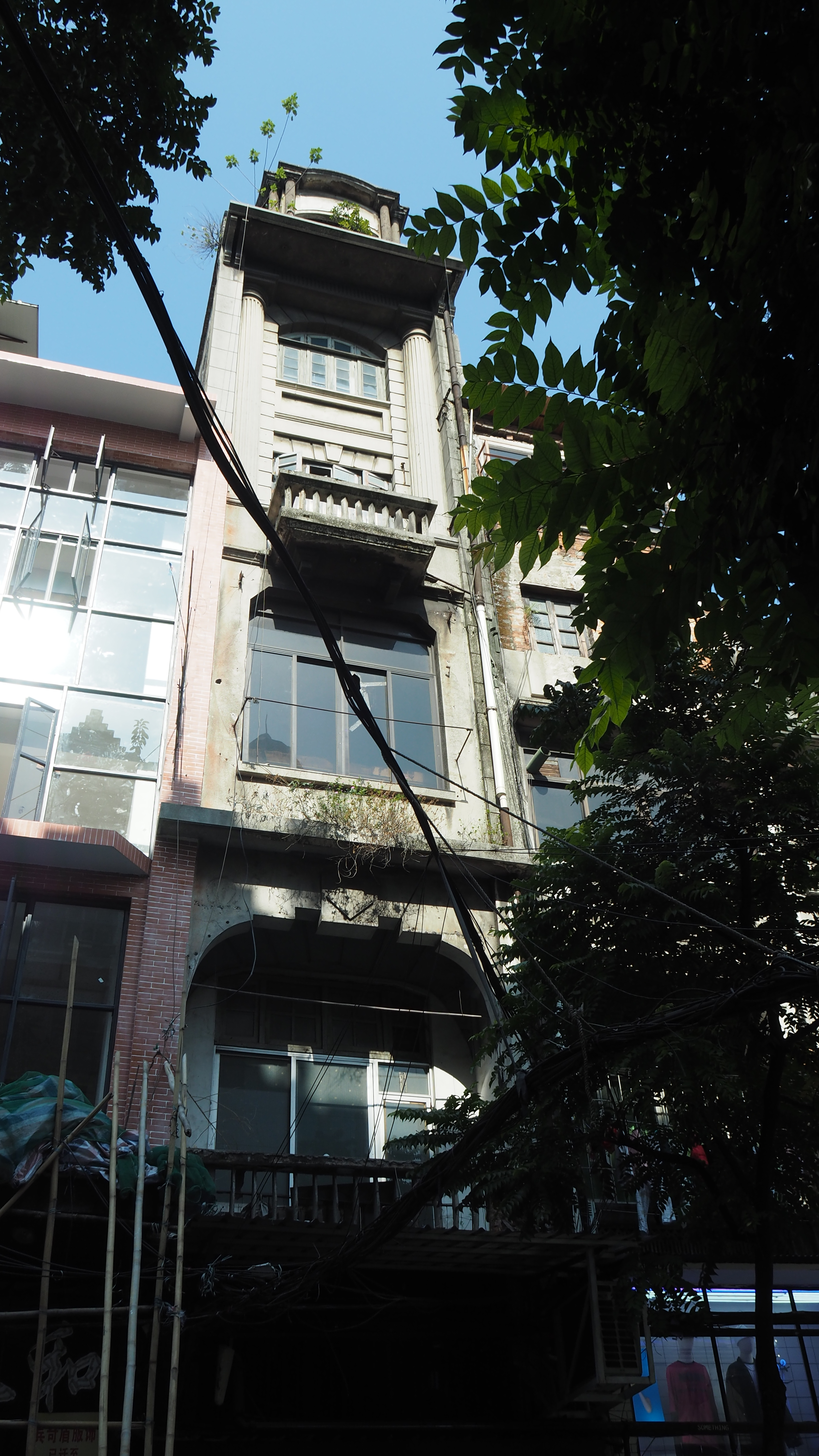 中文（中国大陆）: 位于广东省广州市荔湾区桨栏路46号。